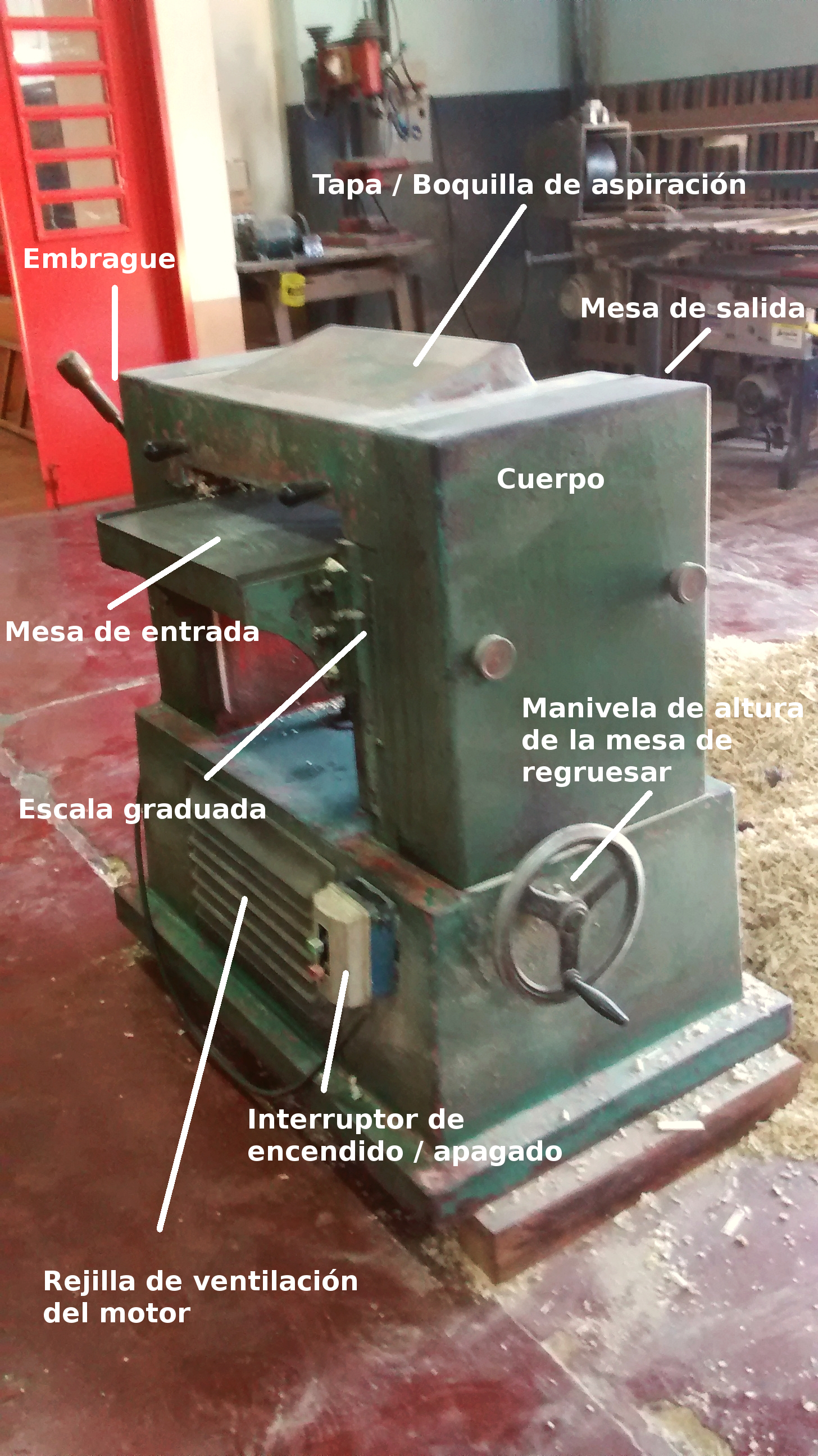 Regruesadora con sus partes externas indicadas. En taller de carpintería de una escuela técnica argentina.